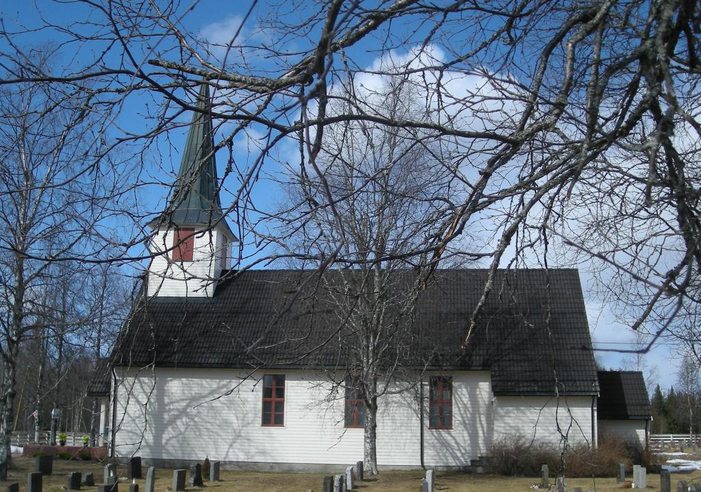 Østby kirke (Trysil kommune)